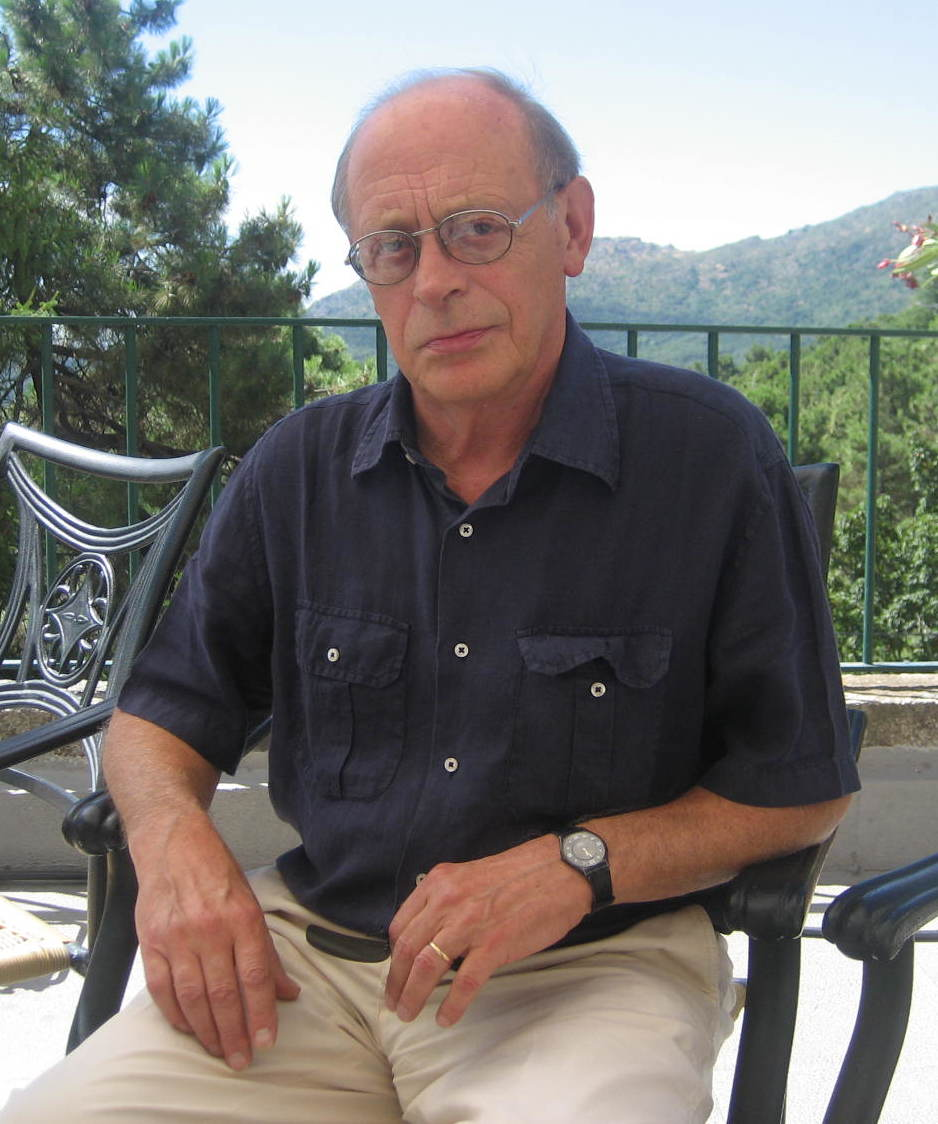 Antonio Tabucchi. Cursos de verano de el escorial 08.